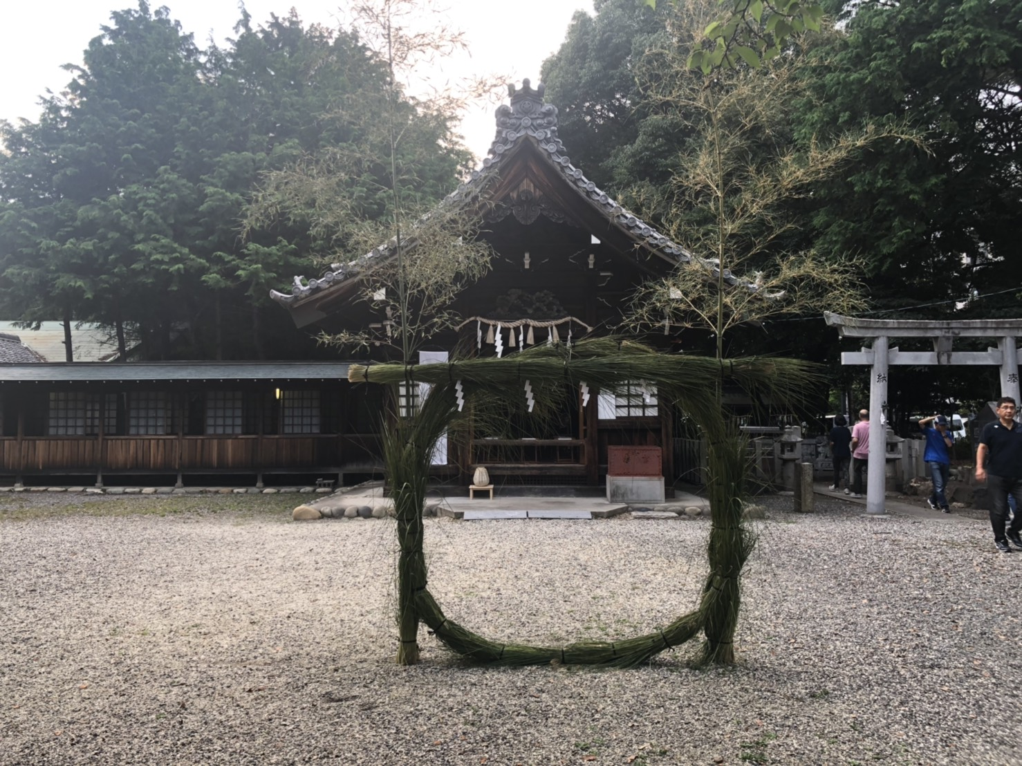 柏井八幡社の輪くぐり